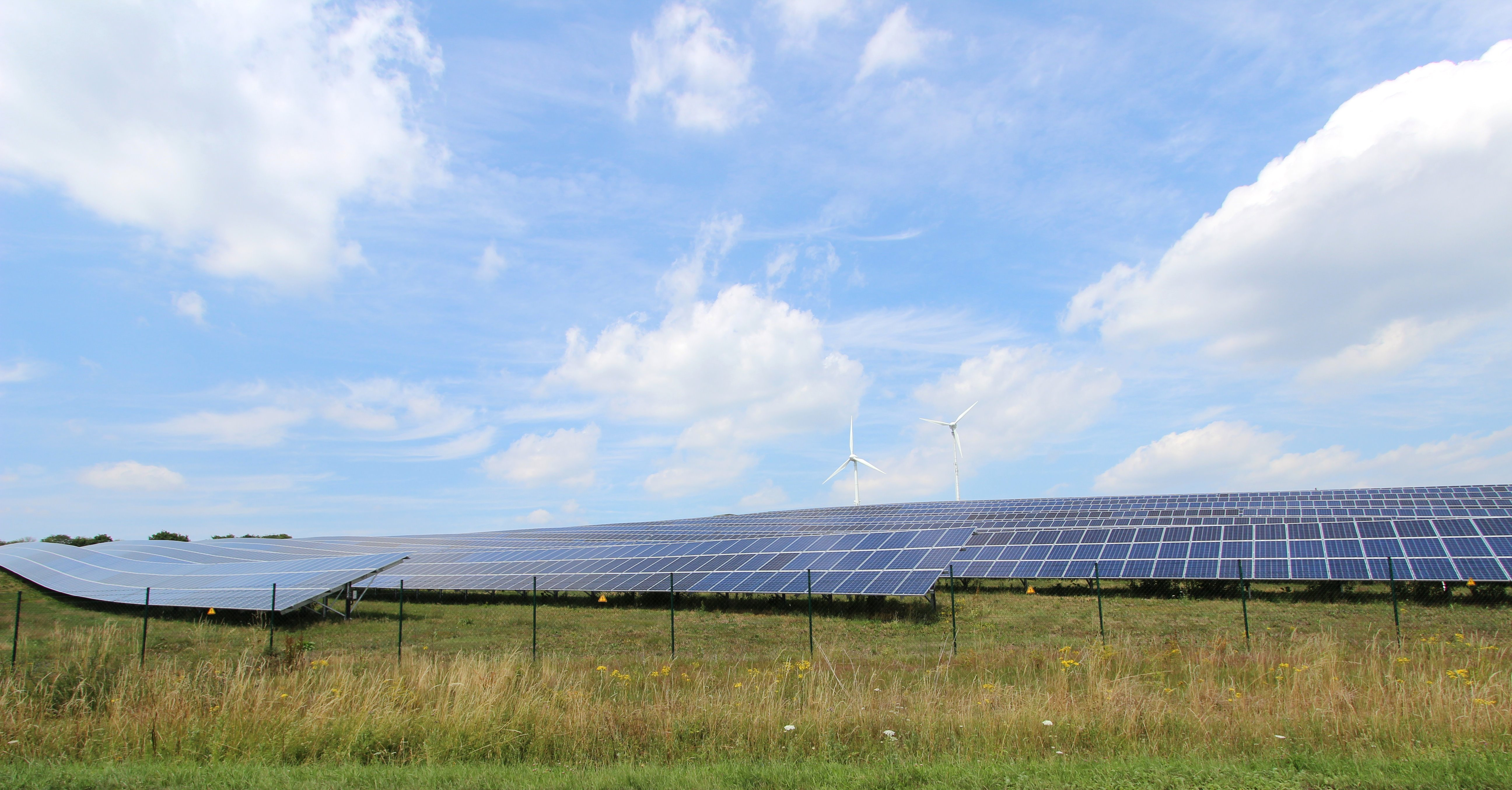 54597 Plütscheid, Solarpark süd-westlich vom Ort; zwischen Feuerscheid und Plütscheid. Aufnahme von 2017.